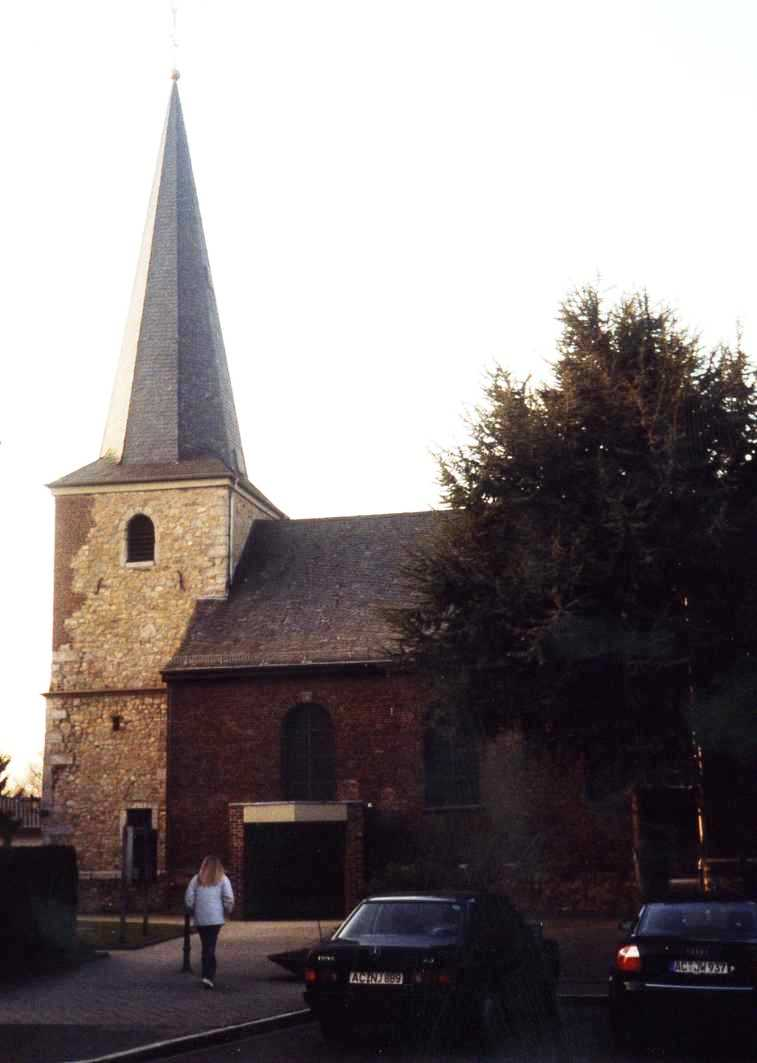 Pfarrkirche in Hehlrath, fotografiert und eingescannt von Besitzer: Eschweiler 2006